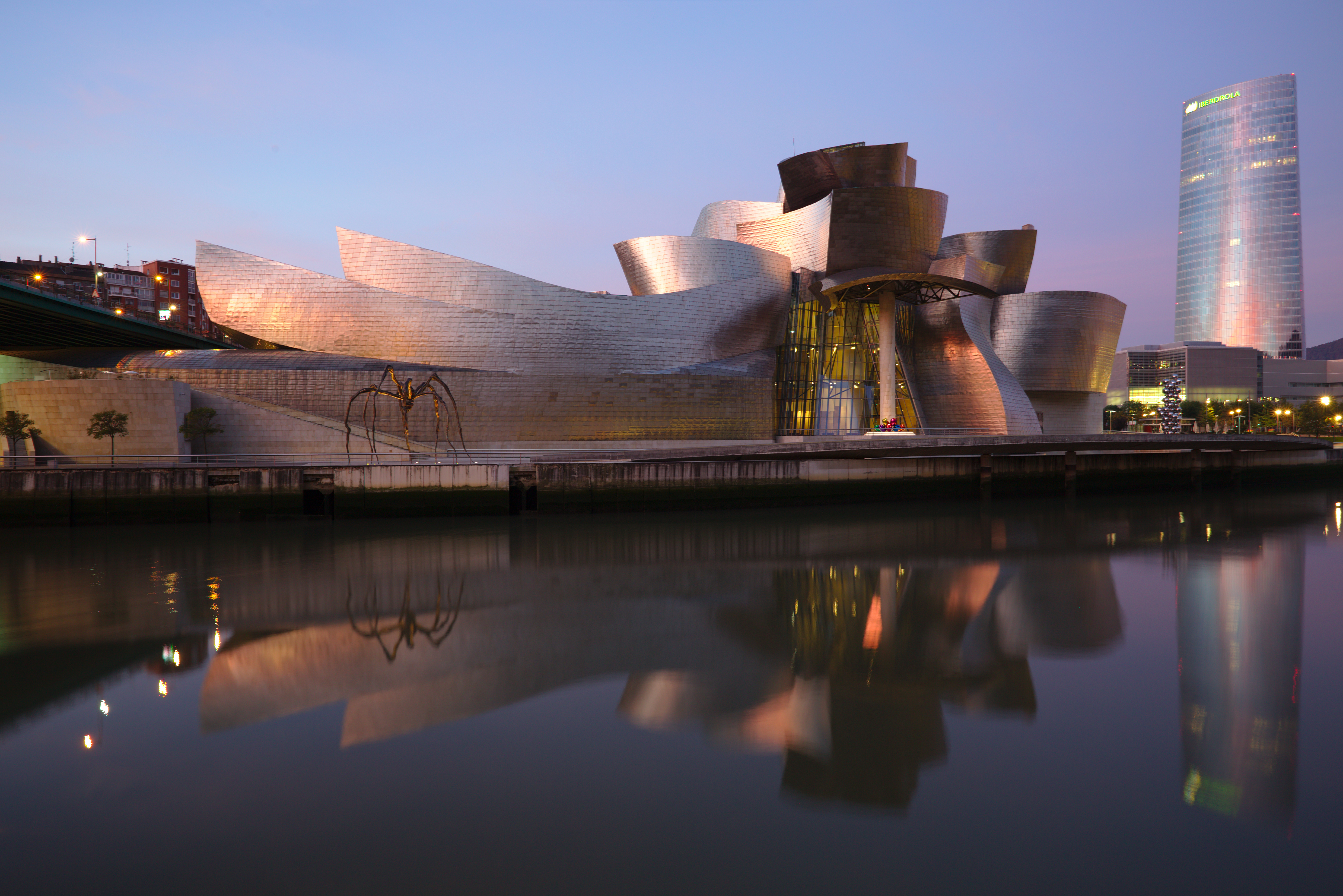 Musée Guggenheim au petit matin